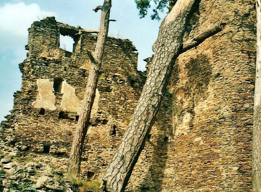 Zbytky paláce hradu Gutstejn.